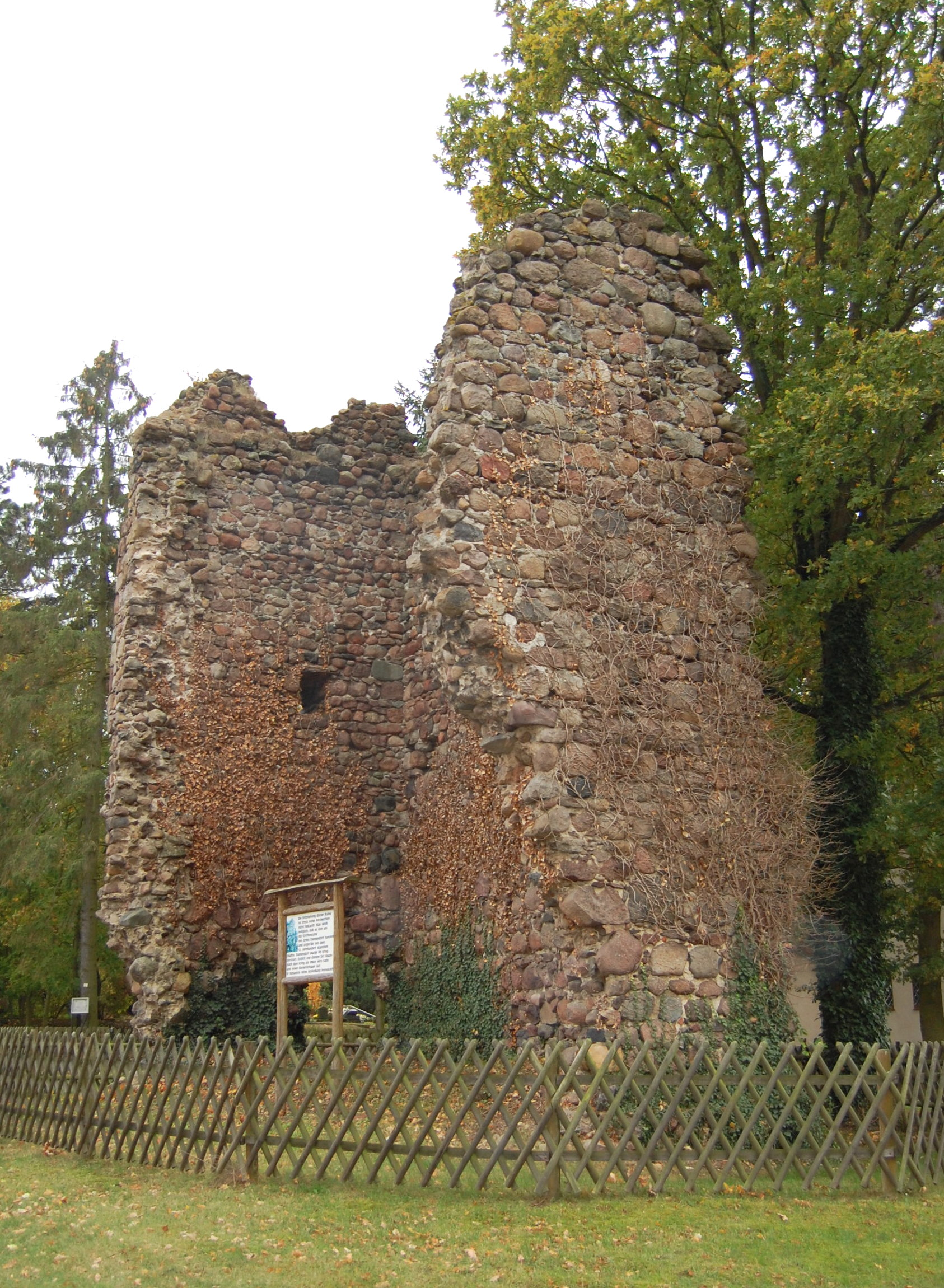 Kirchturmruine Dannenfeld in Immekath